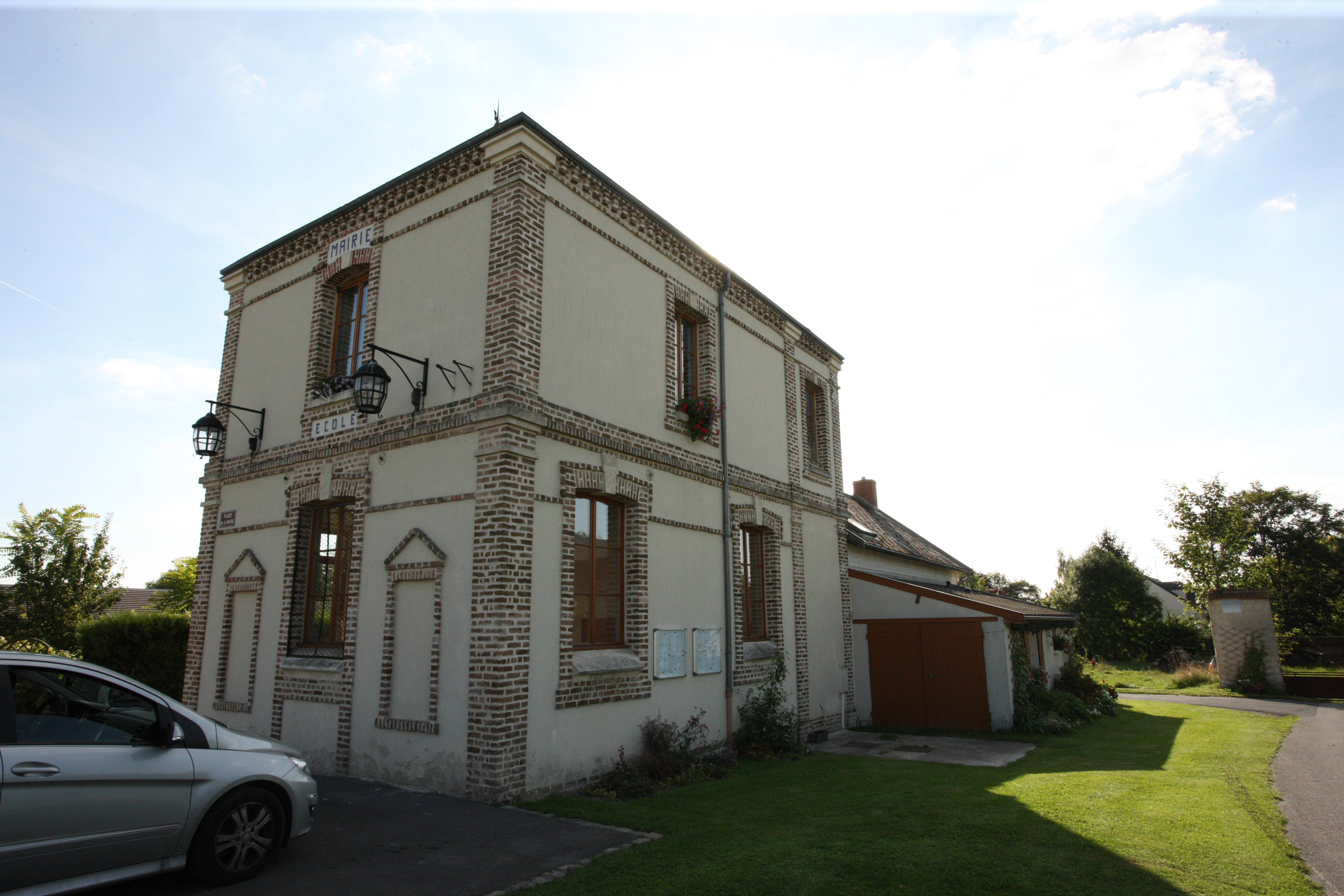 Village Ardennais